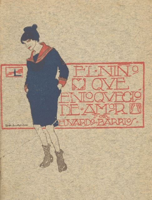 Portada de la segunda edición de la novela del escritor chileno Eduardo Barrios El niño que enloqueció de amor